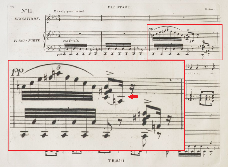 Modification de l'image "Die Stadt tirage Haslinger sans coquille.png"